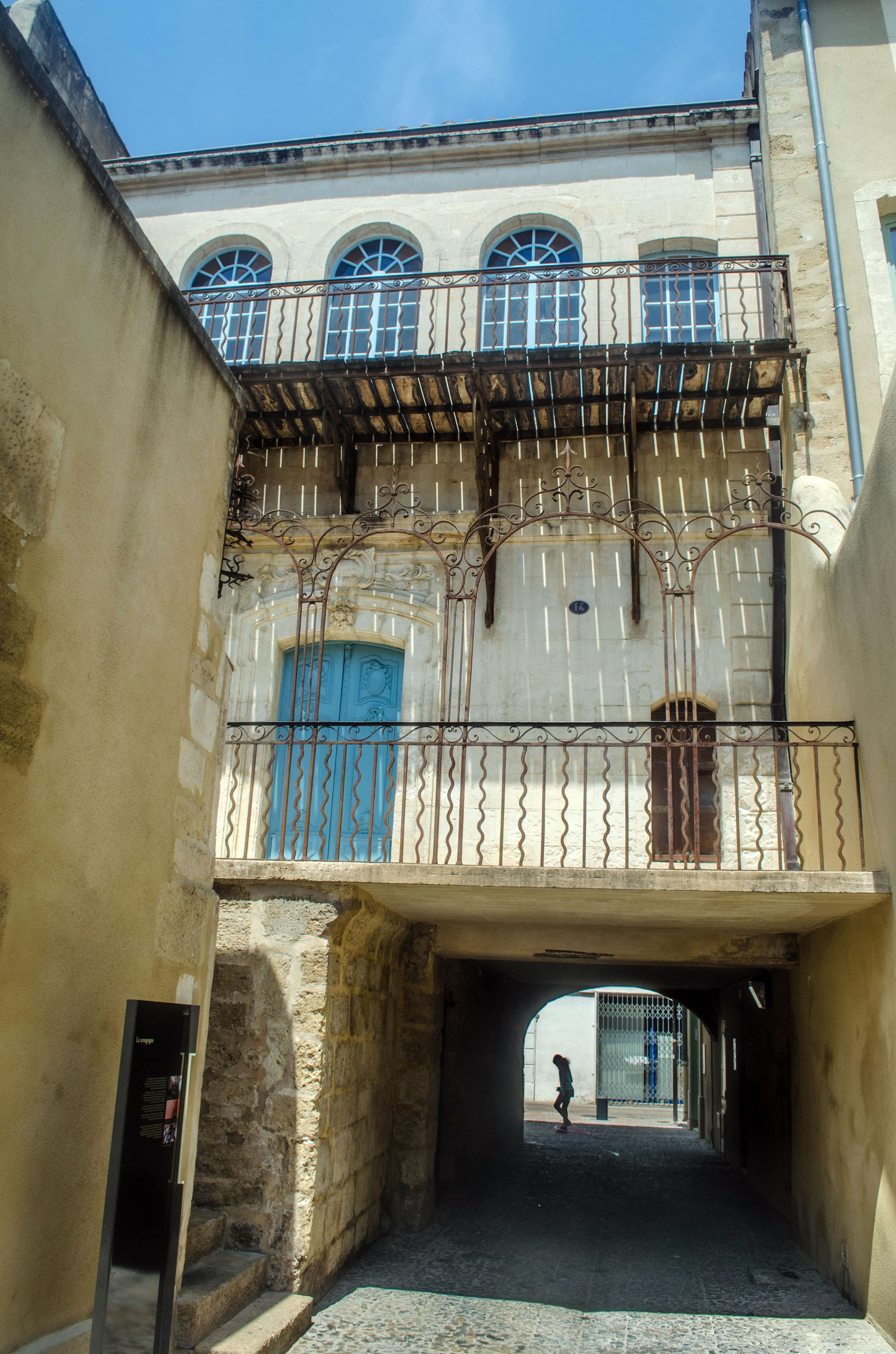 Cavaillon (Vaucluse, Provence-Alpes-Côte d'Azur, France). Synagogue, rue Hébraïque.